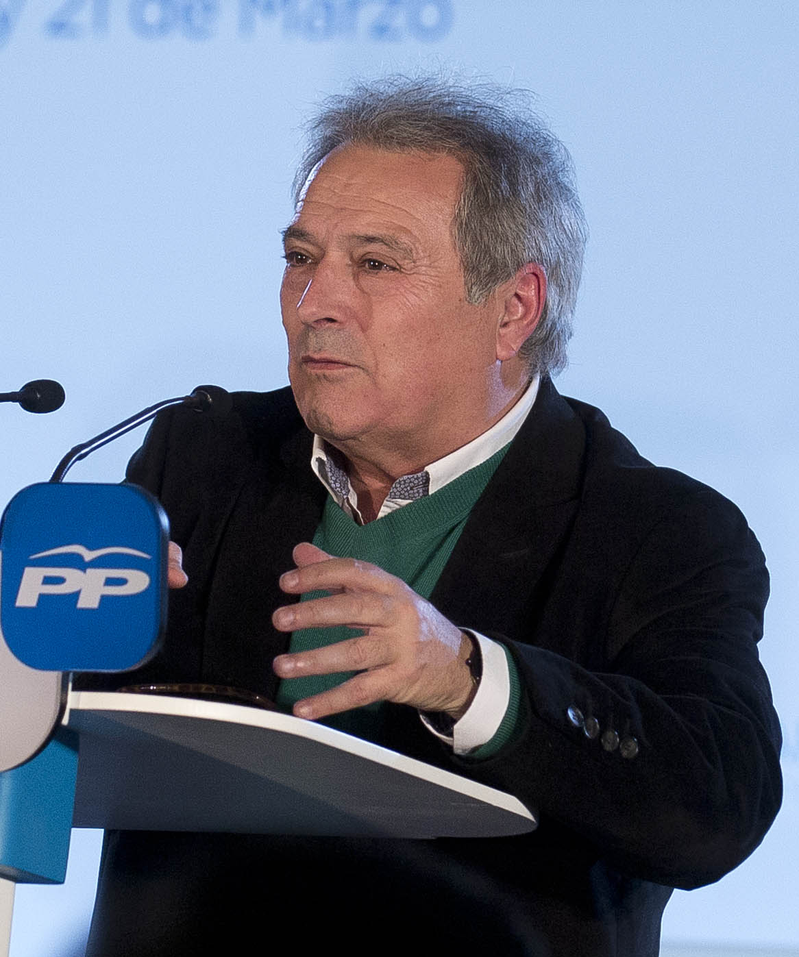 VALENCIA.